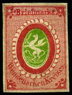 Почтовая марка Венденской местной почты четвёртого выпуска